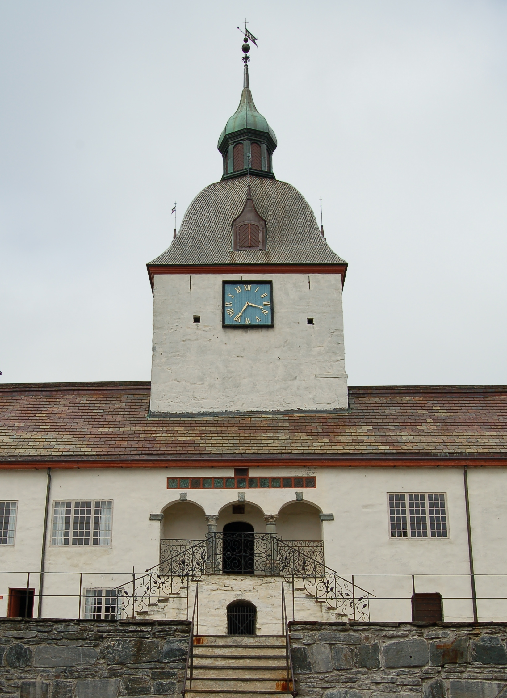 Loggiaen Austråttborgen